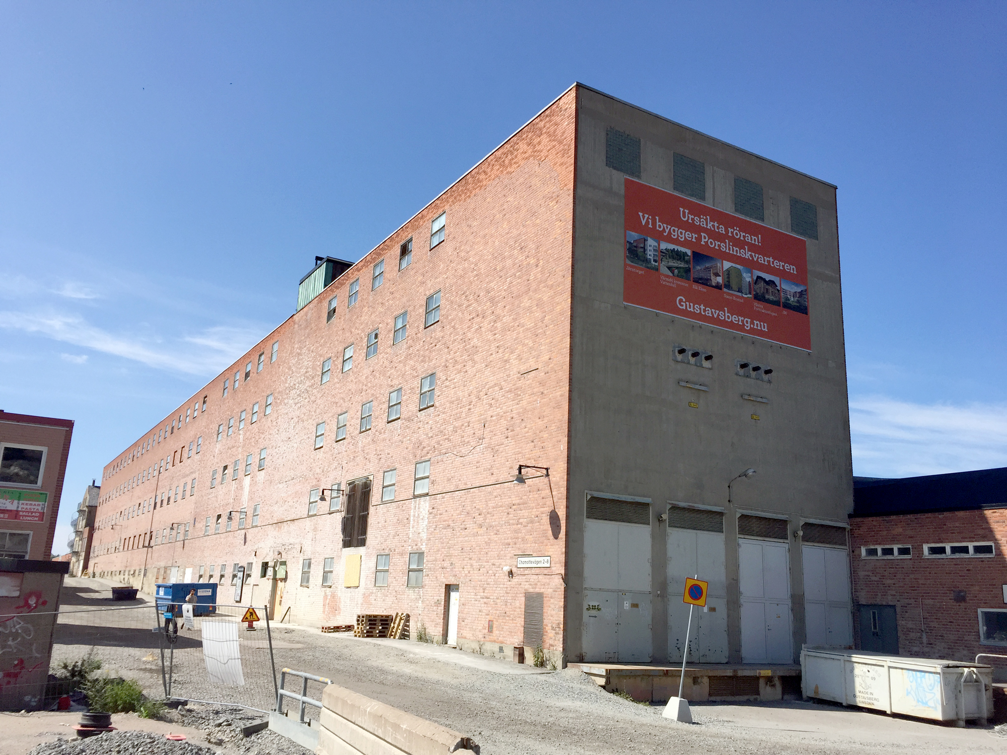 Gustavsberg porslinsfabrik i Gustavsberg, Värmdö kommun